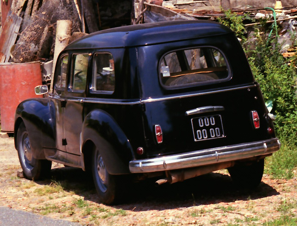 Peugeot 203 Familiale